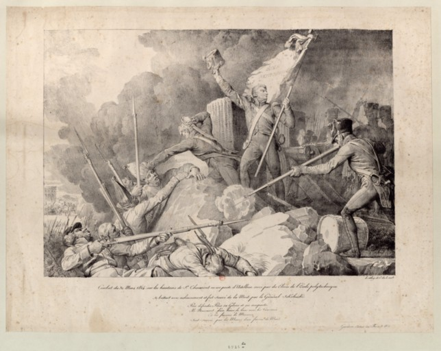 Combat du 30 Mars 1814. Sur les hauteurs de Saint Chaumont où un poste d'Artillerie servi par des Éleves de l'École polytechnique se battait avec acharnement et fut sauvé de la Mort par le général Sokolnicki [Image fixe] : [estampe] Sous le tr. c., à dr. «Lithog. de C. de Last[eyrie].». - Copie inversée et légèrement modifiée d'une lith., dont une épr. est conservée dans le rec. Qb. 137 1 est. : lithographie ; 34,6 x 49,3 cm